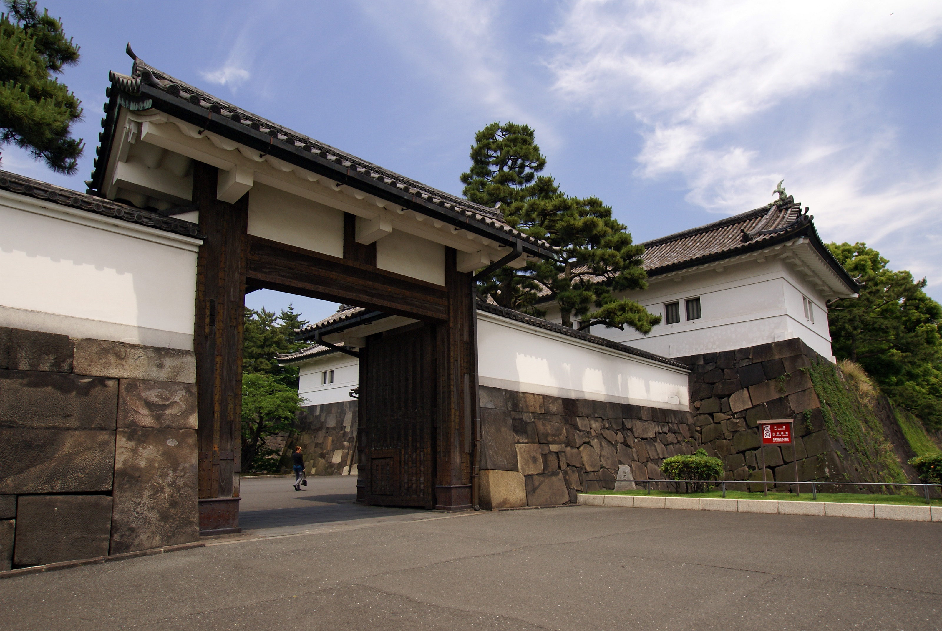 Sakuradamon of Edo Castle in Chiyoda-ku, Tokyo, Japan